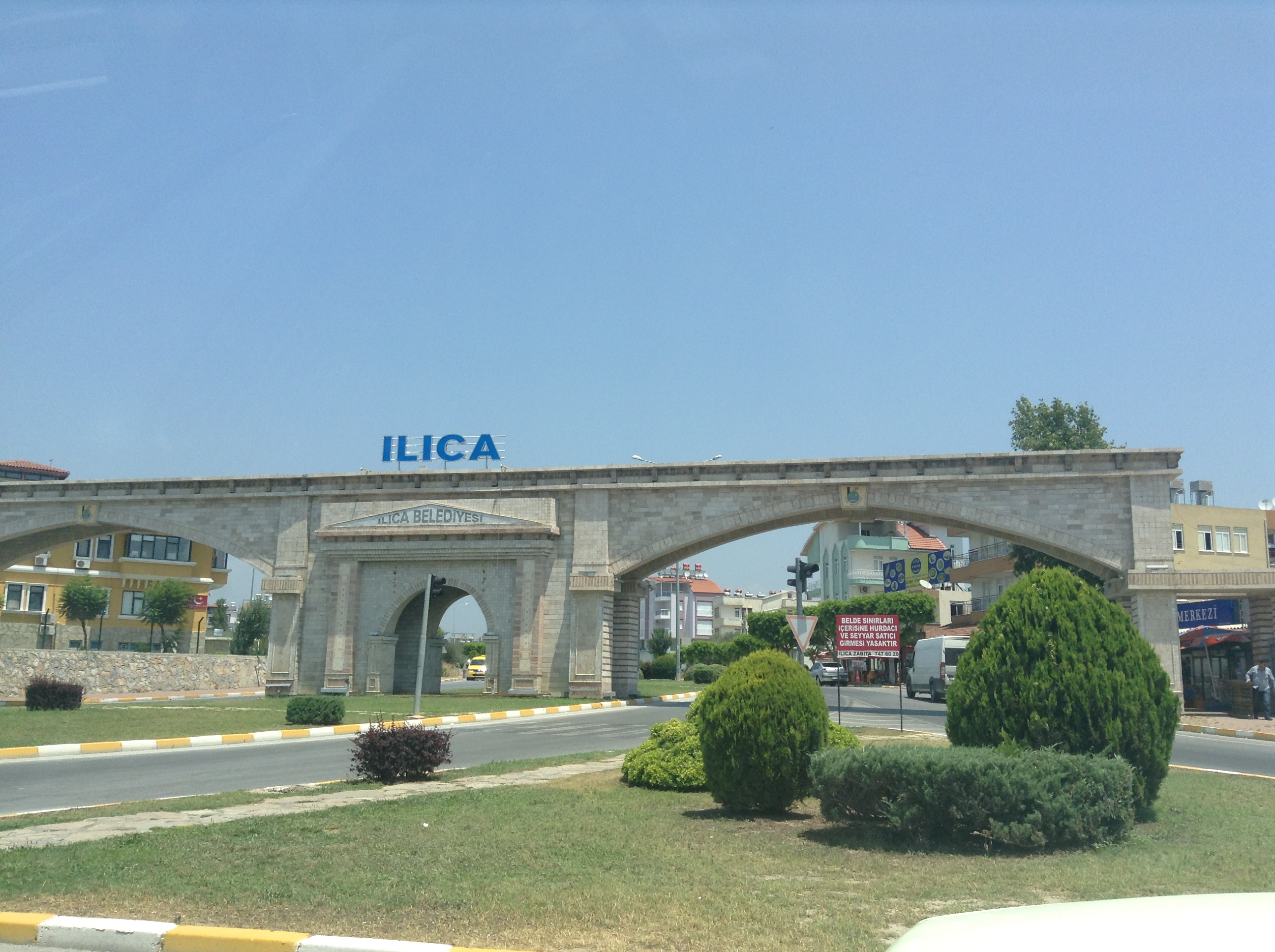 Ilıca giriş kapısı